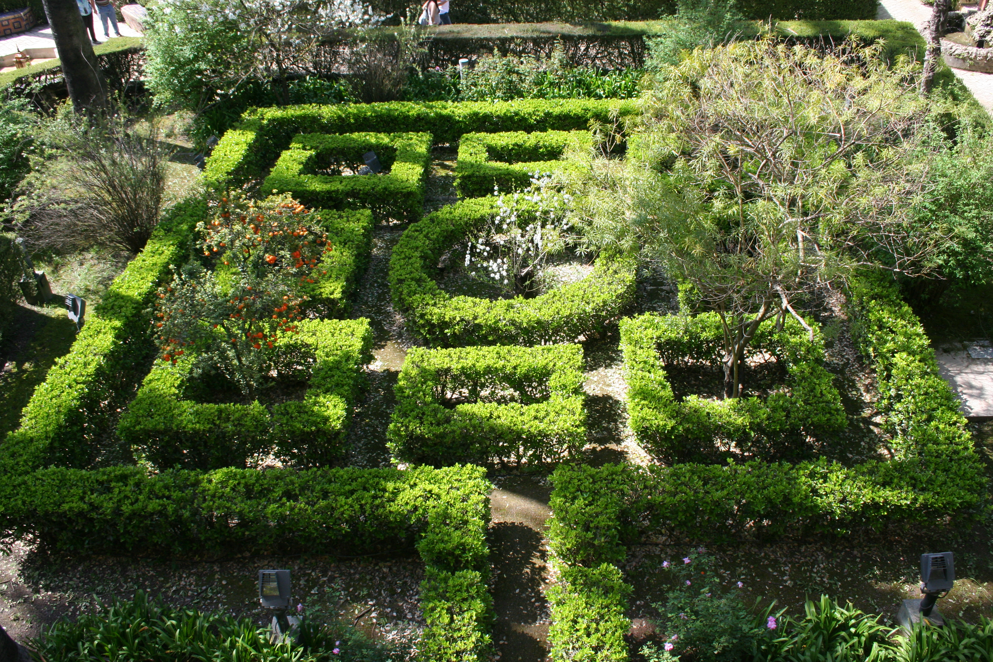 es|Jardines del Alcázar de Sevilla.